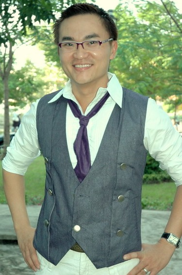 Ảnh chụp diễn viên Đại Nghĩa